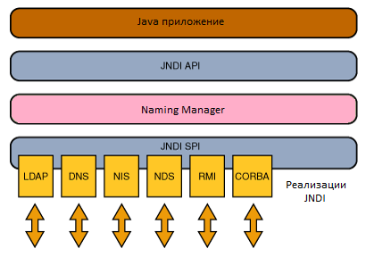 Схема взаимодействия компонентов Java Naming Directory Interface